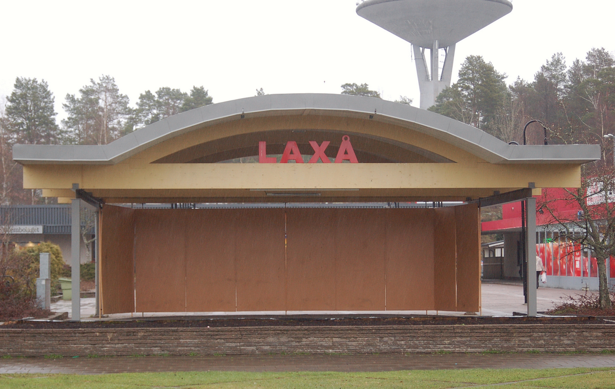 Centrumtorget i Laxå, Sverige, med scenen och vattentornet i bakgrunden.